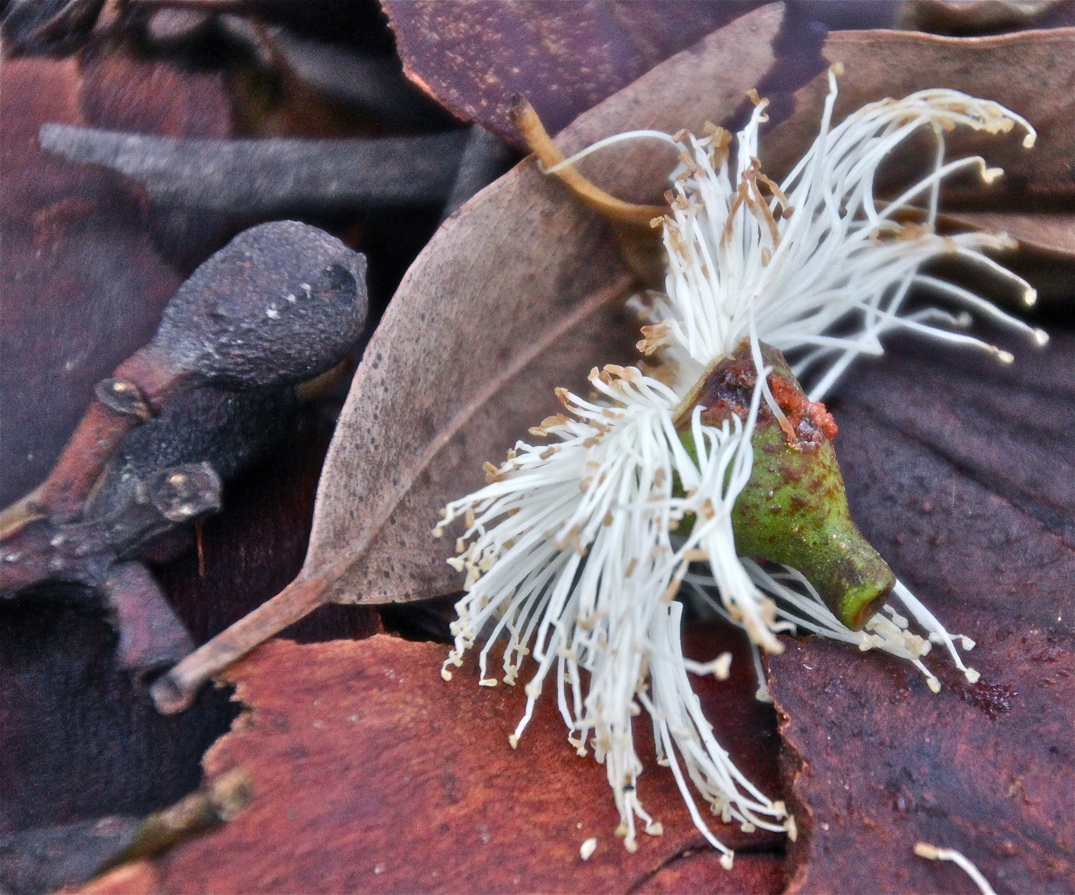 Corymbia henryi flower